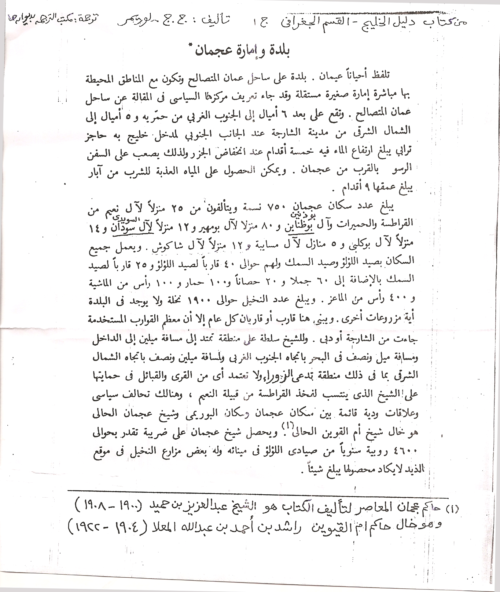 سكان مدينة عجمان